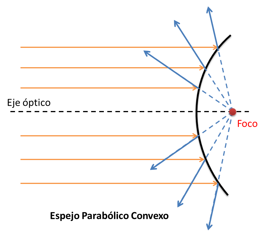 Espejo parabólico convexo